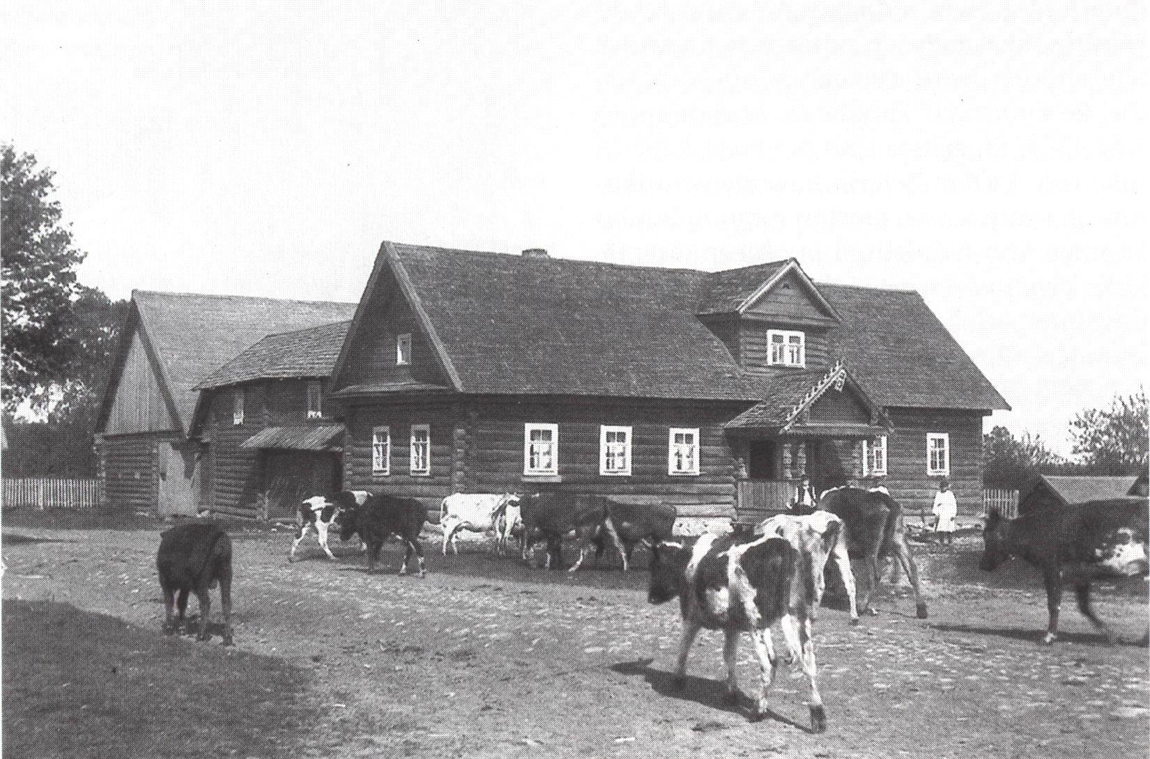 Деревня Вирки, дом Матти Пуки.